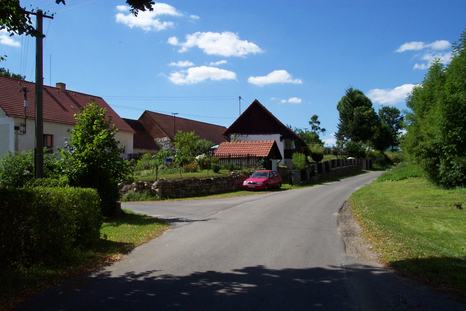 Náves v Držově, části obce Vojníkov